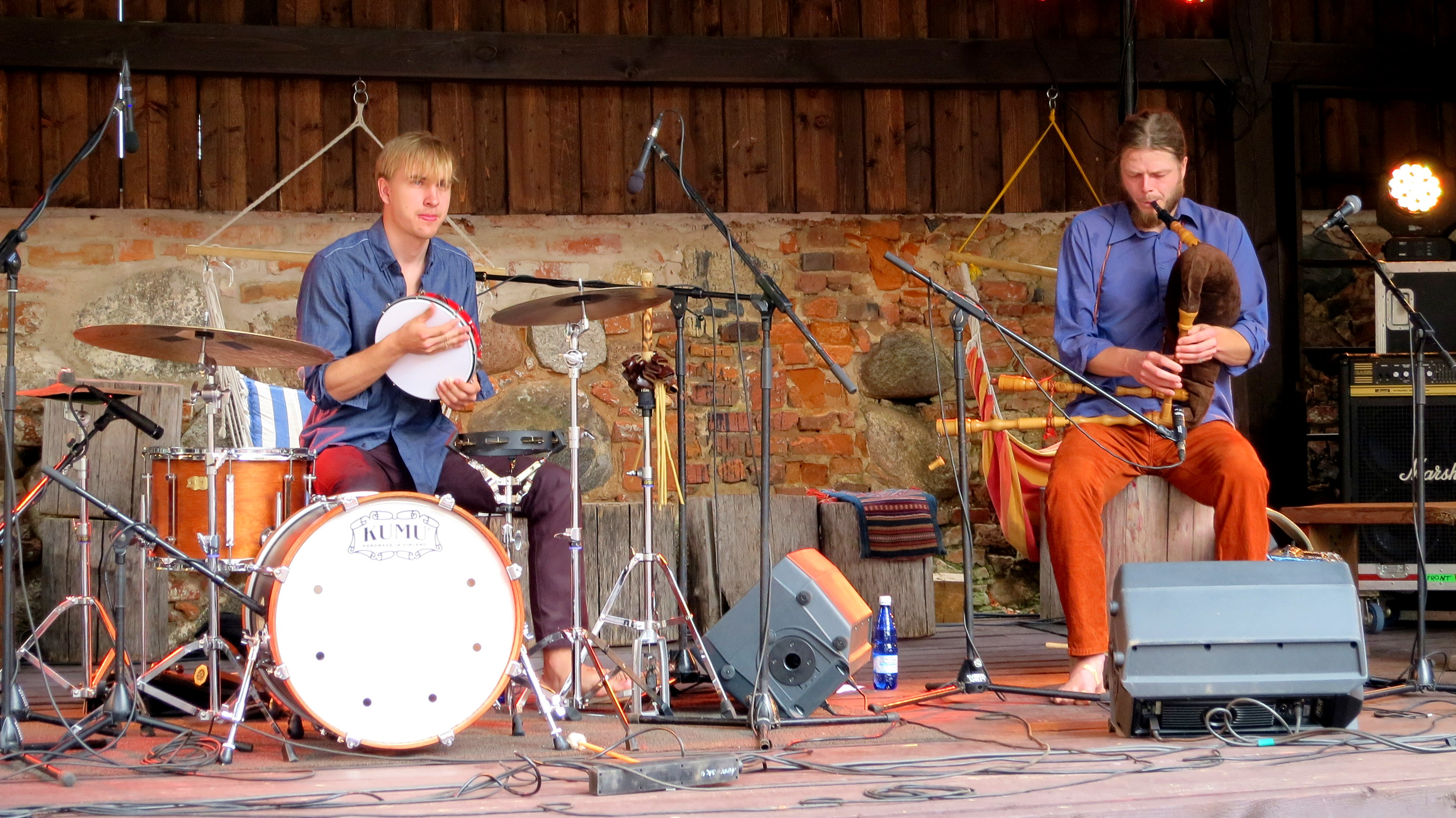 Duo Malva & Kirsipu Tartu Hansapäevadel 2014